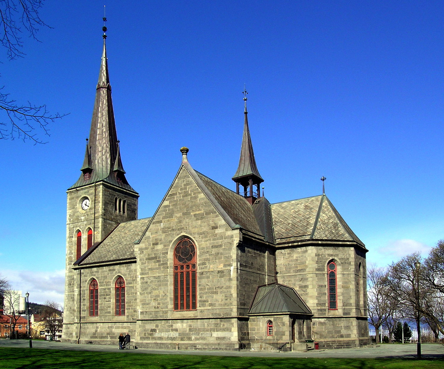 Ila kirke, Trondheim. Bygd 1889. Arkitekt: Eugen Sissenère.